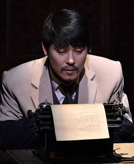 뮤지컬 벽을 뚫는 남자 프레스콜